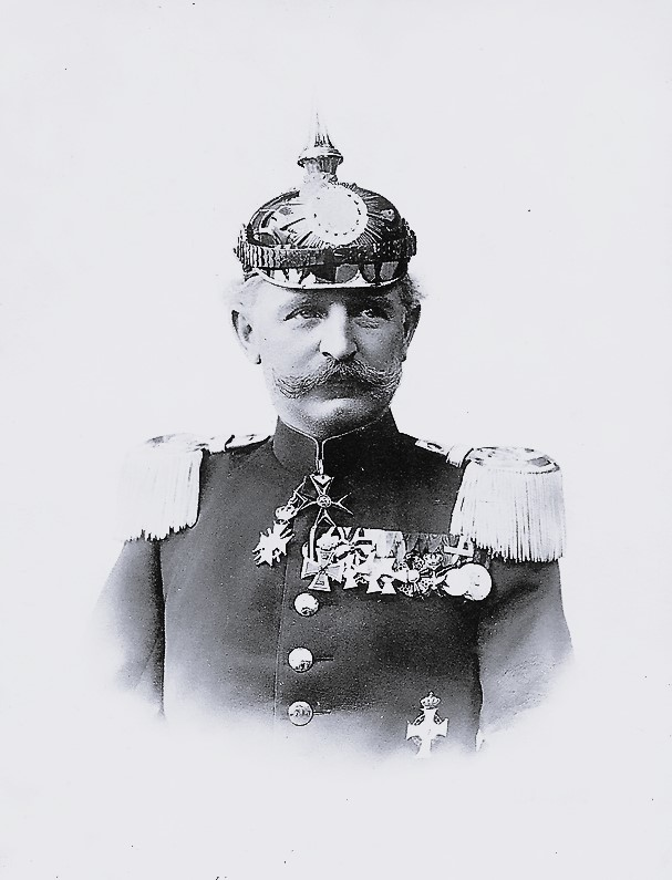 Oberst Theodor von Paczensky und Tenczin